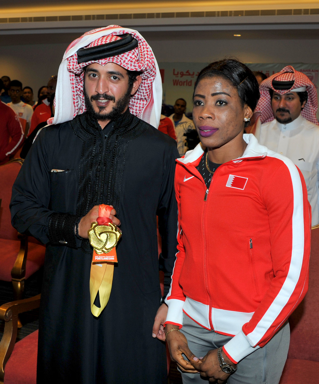 خلال حفل تكريم اللاعبة أولكيمي بمناسبة حصولها على المركز الأول والميدالية الذهبية ببطولة العالم داخل الصالات المغلقة بمدينة بورتلاند الأمريكية